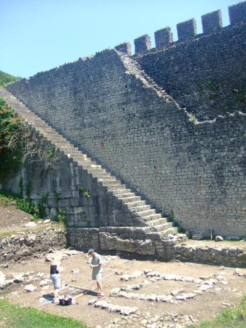 Nokalakevi